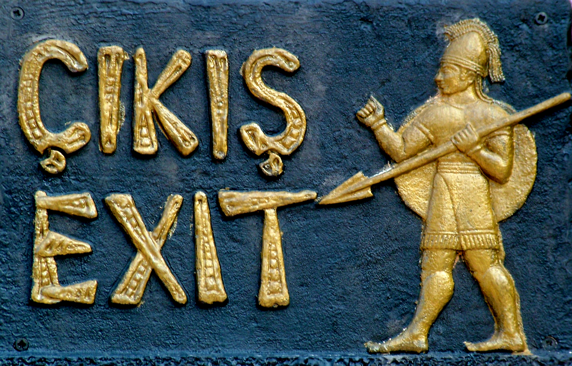 Anatóliai Civilizációk Múzeuma, Ankara: Irányítótábla